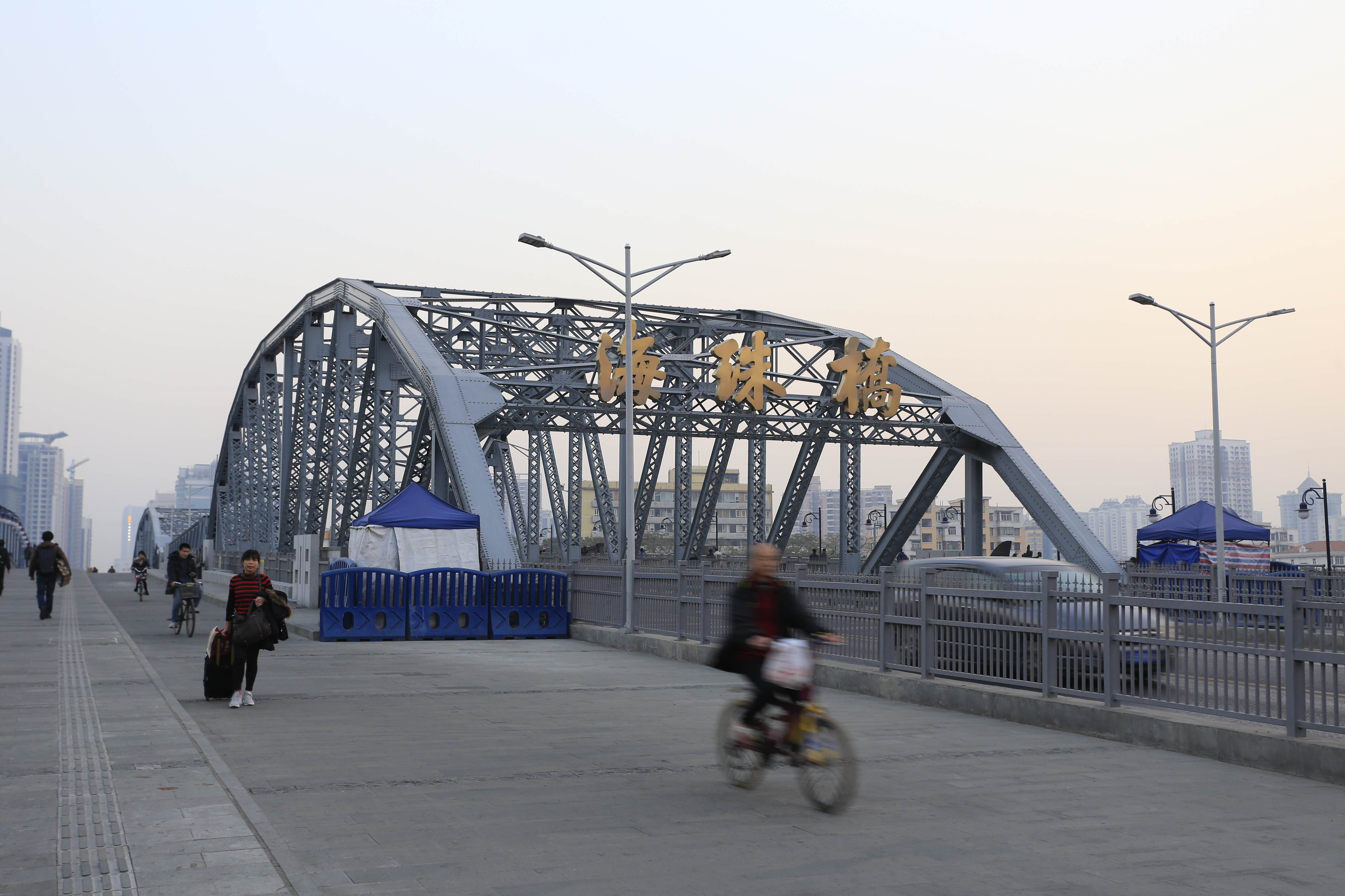 海珠橋